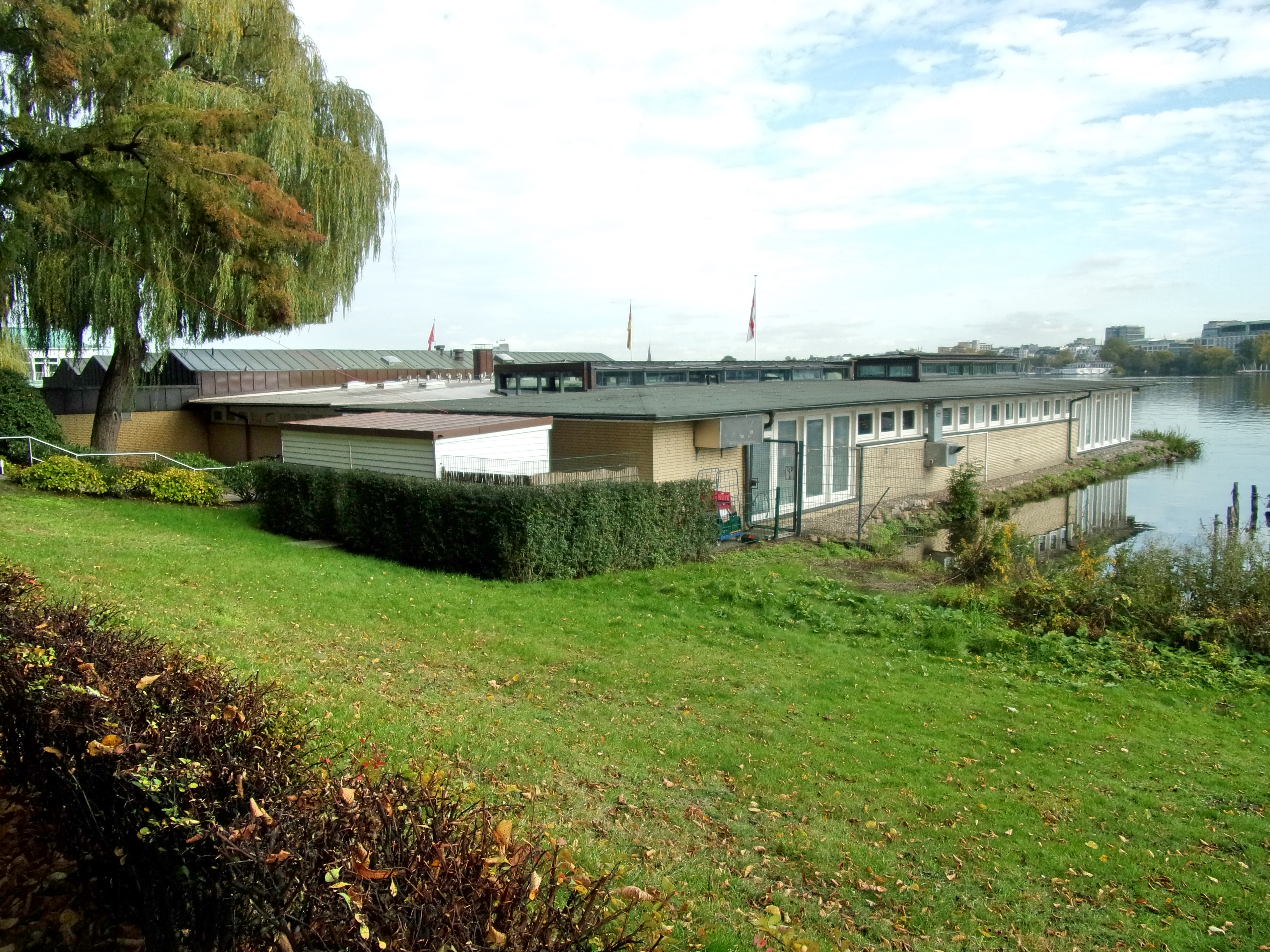 Vereinsheim des Ruderclubs Favorite Hammonia an der Außenalster, Alsterufer 9 in Hamburg-Rotherbaum.